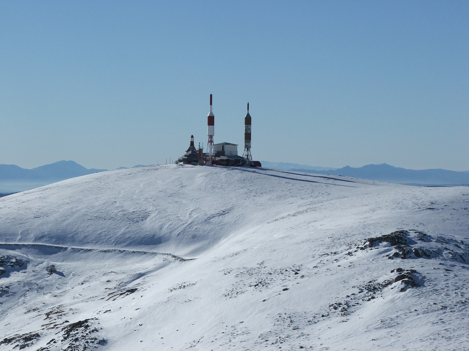 Zelf gemaakte foto in 2005, DrTW